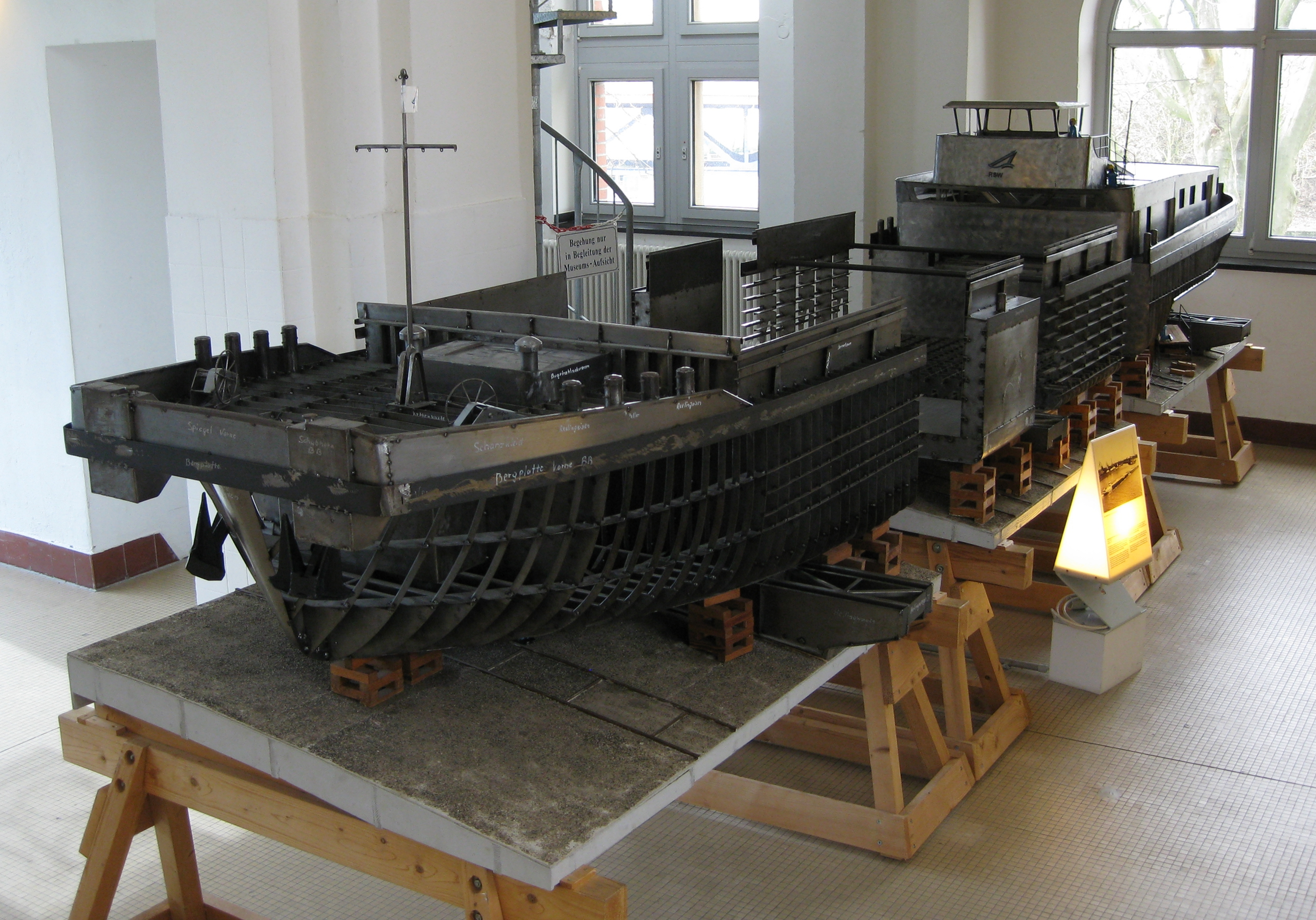 Duisburg, Museum der Deutschen Binnenschifffahrt: Modell des Schubmotorschiffs «Haniel 61» (Bj. 1983) im Maßstab 1:10; gefertigt 1996/1997 als ABM/Arbeitsbeschaffungsmaßnahme der NRSW/Neuen Ruhrorter Schiffswerft.